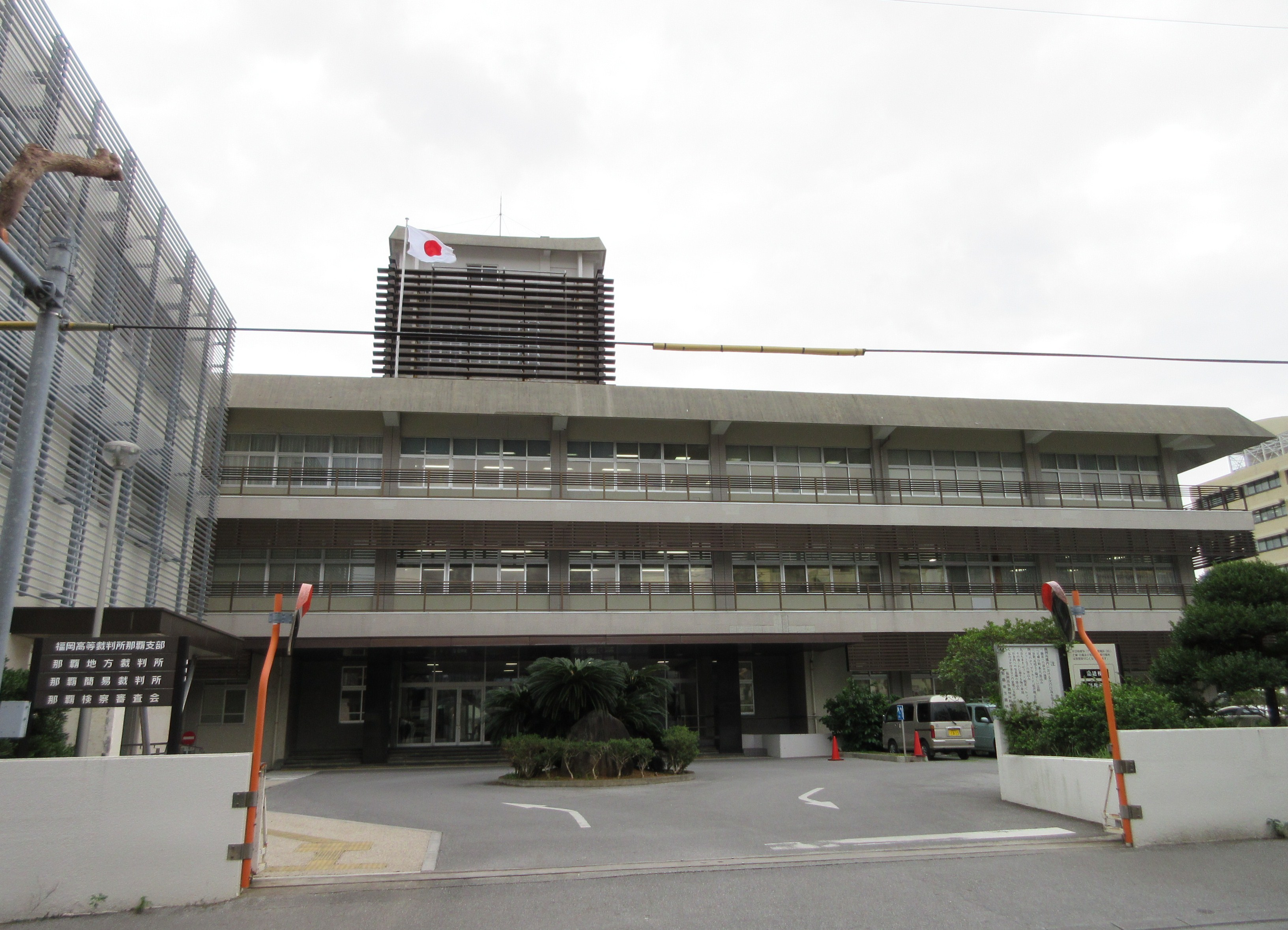 福岡高等裁判所那覇支部、那覇地方裁判所